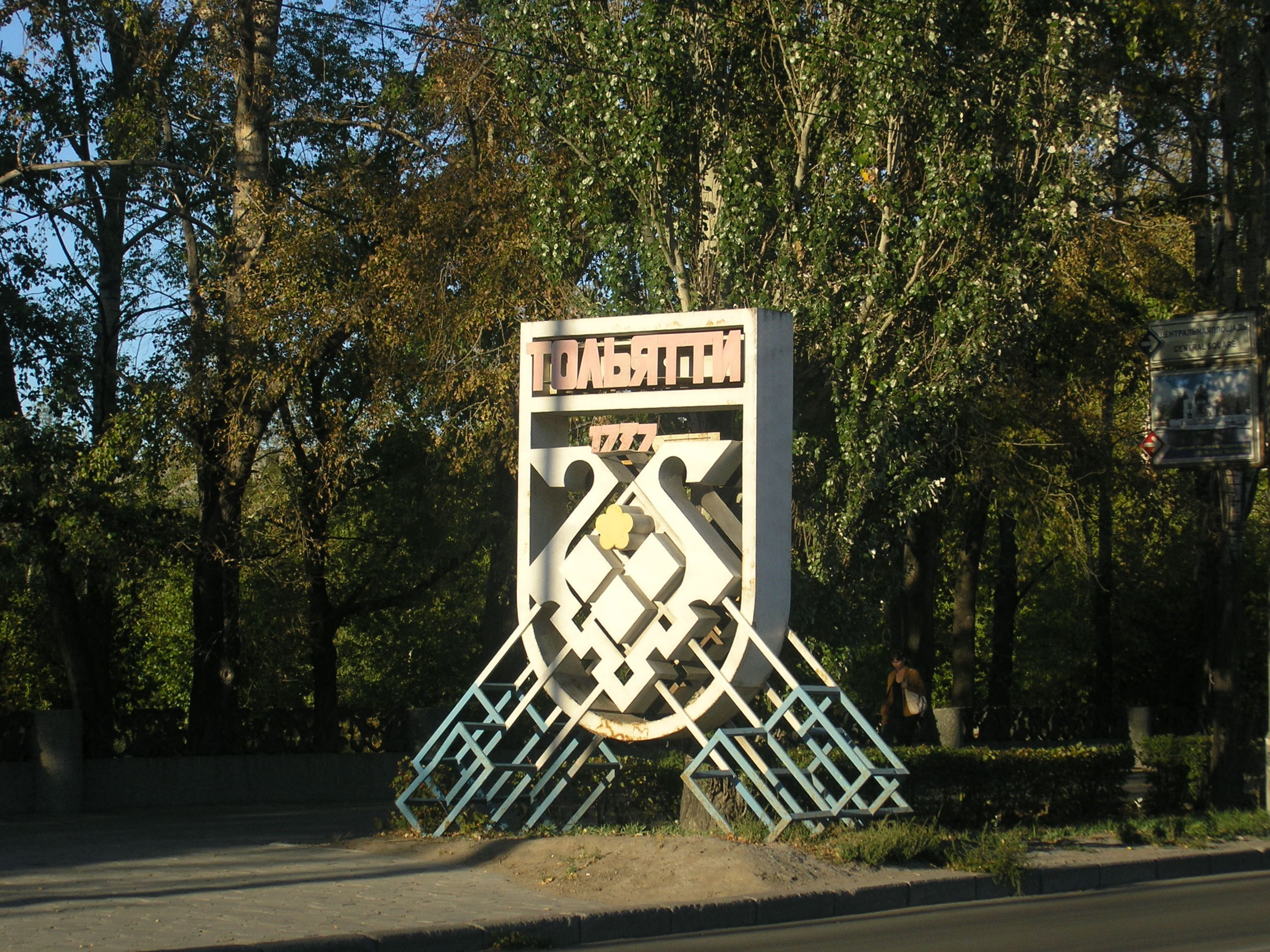 Архитектурная композиция со стилизованным гербом города. Тольятти. Одна из нескольких, установленных к празднованию 250-летия города в 1987 году.